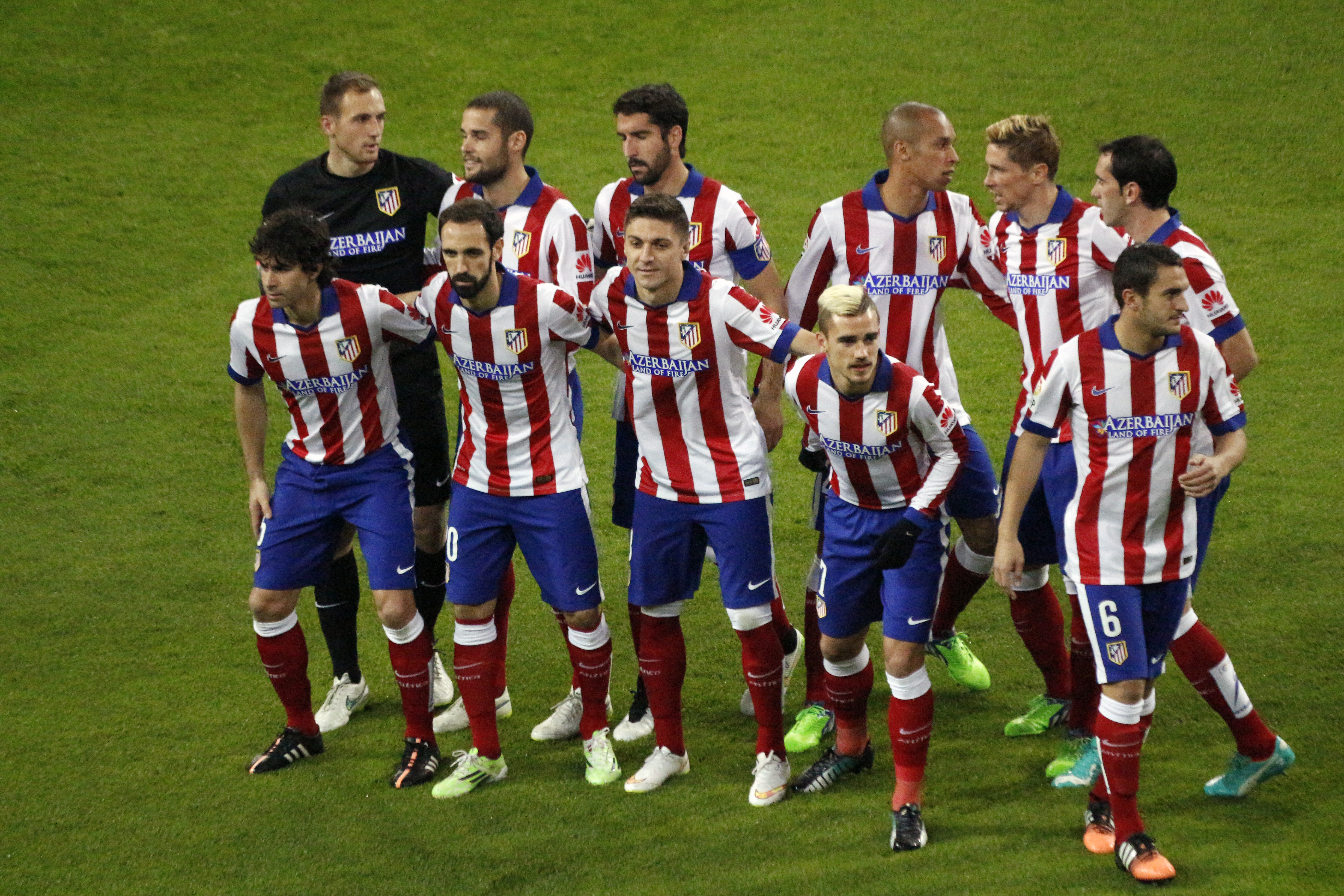 Antoine Griezmann Diego Godín Fernando Torres Guilherme Siqueira Jan Oblak Juanfran Koke Mario Suárez Miranda Raúl García Tiago Mendes Copa del Rey - Round of 16 Real Madrid vs Atlético Madrid Estadio Santiago Bernabéu, Madrid